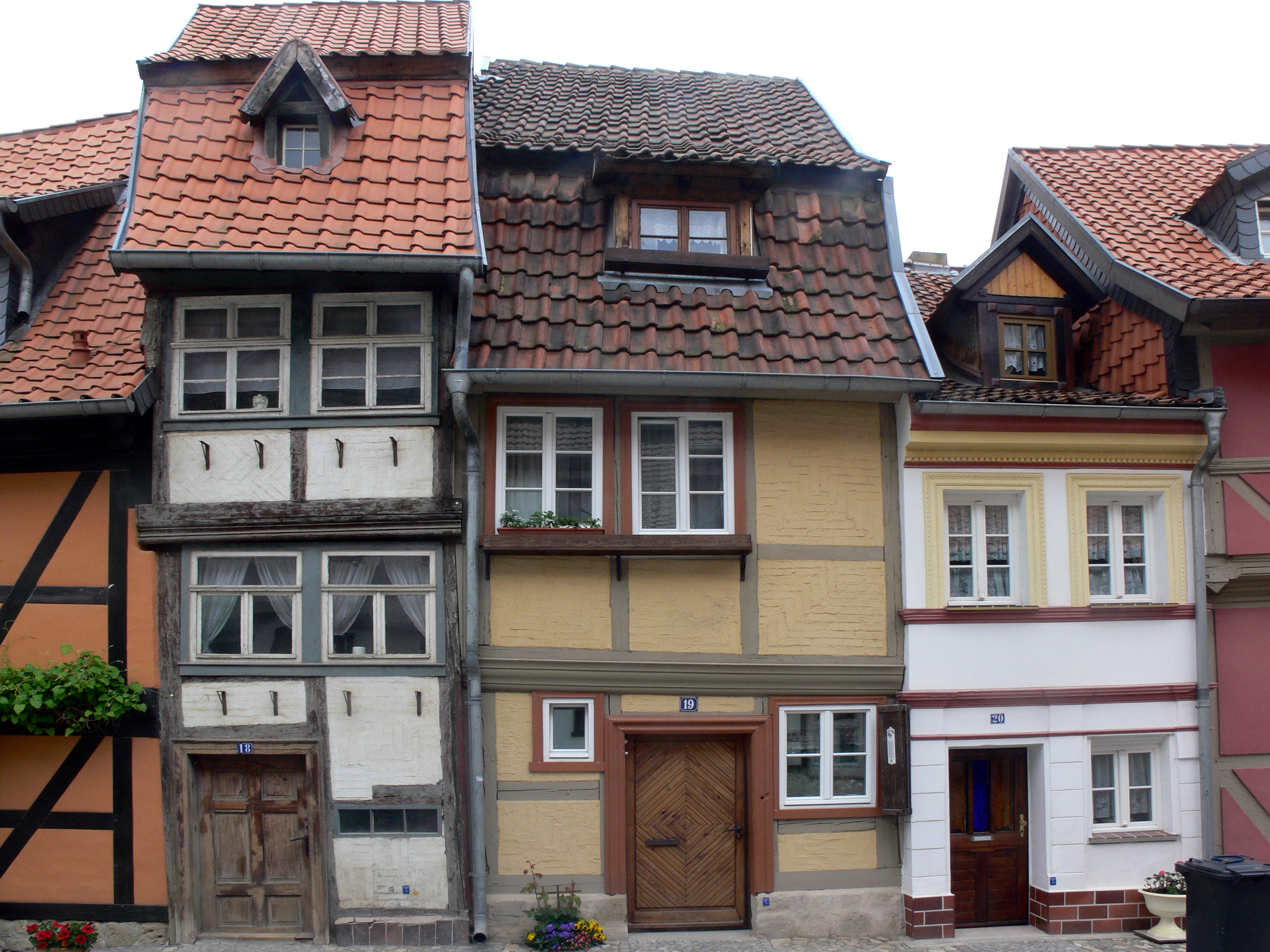 Wassertorstraße 18-20 in Quedlinburg. Die schmalsten Häuser der Stadt.